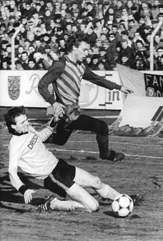 ADN-ZB-Häßler 14.3.87-ma-Dresden: Fußball-Oberligaspiel Dynamo Dresden - BFC Dynamo 3:2- Großer kämpferischer Einsatz zweier Torschützen. Links Matthias Döschner, der in der 23. Minute für Dresden das 2:1 erzielte. Der Berliner Dynamo-Spieler Thomas Doll brachte seine Mannschaft bereits in der 12. Minute in Führung.